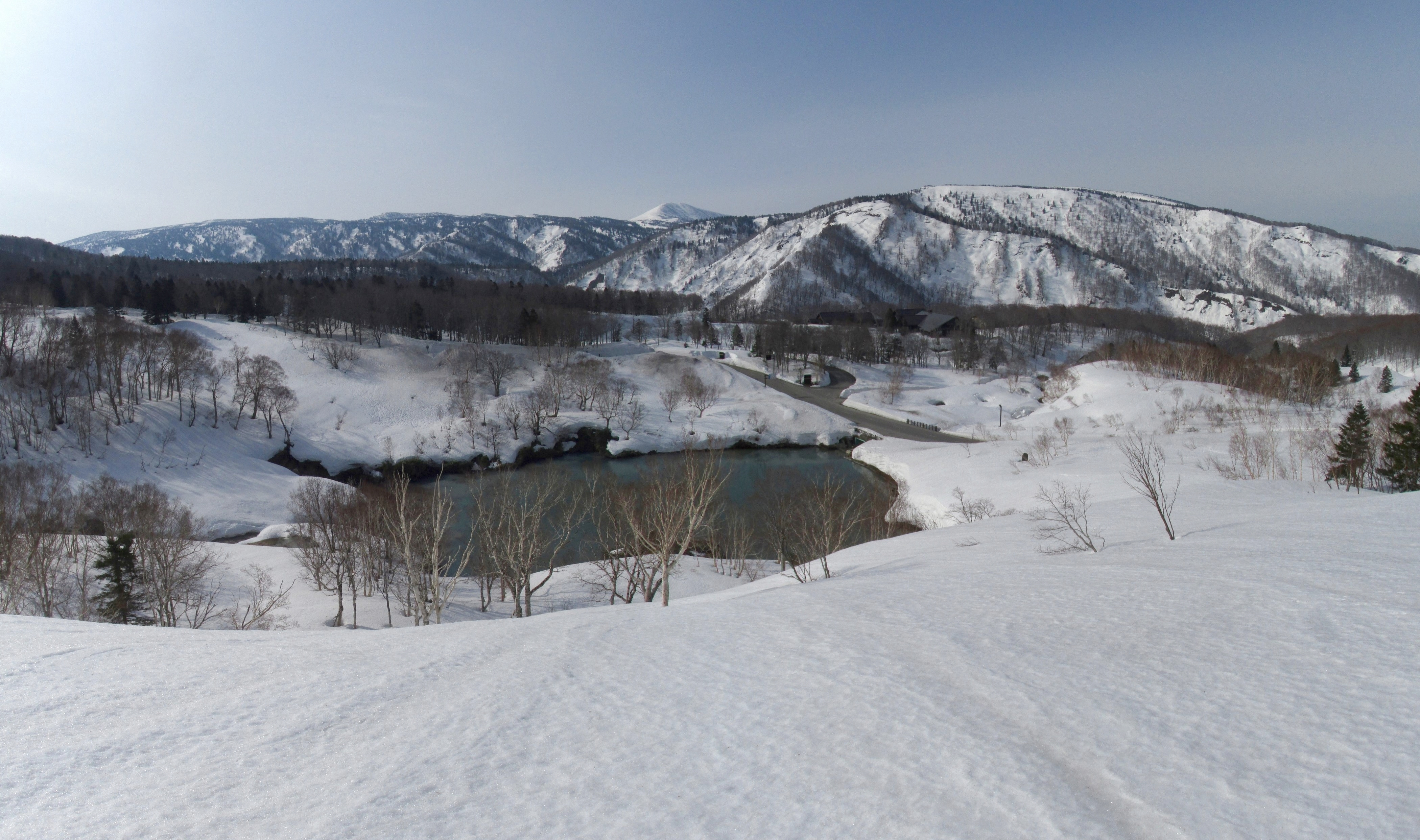 青森県青森市荒川南荒川山国有林酸ケ湯沢「地獄沼」 Microsoft ICE Ver.2 ６枚合成（ステッチ）